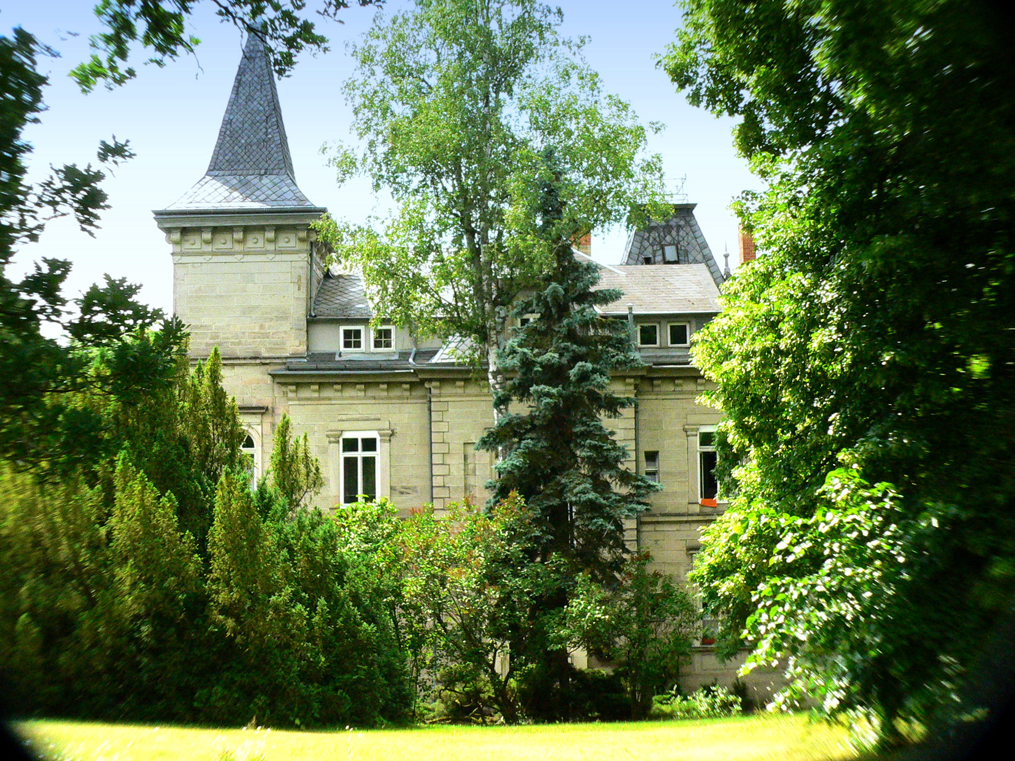 Coburg Hohe Straße 30 - Haus unter Denkmalschutz